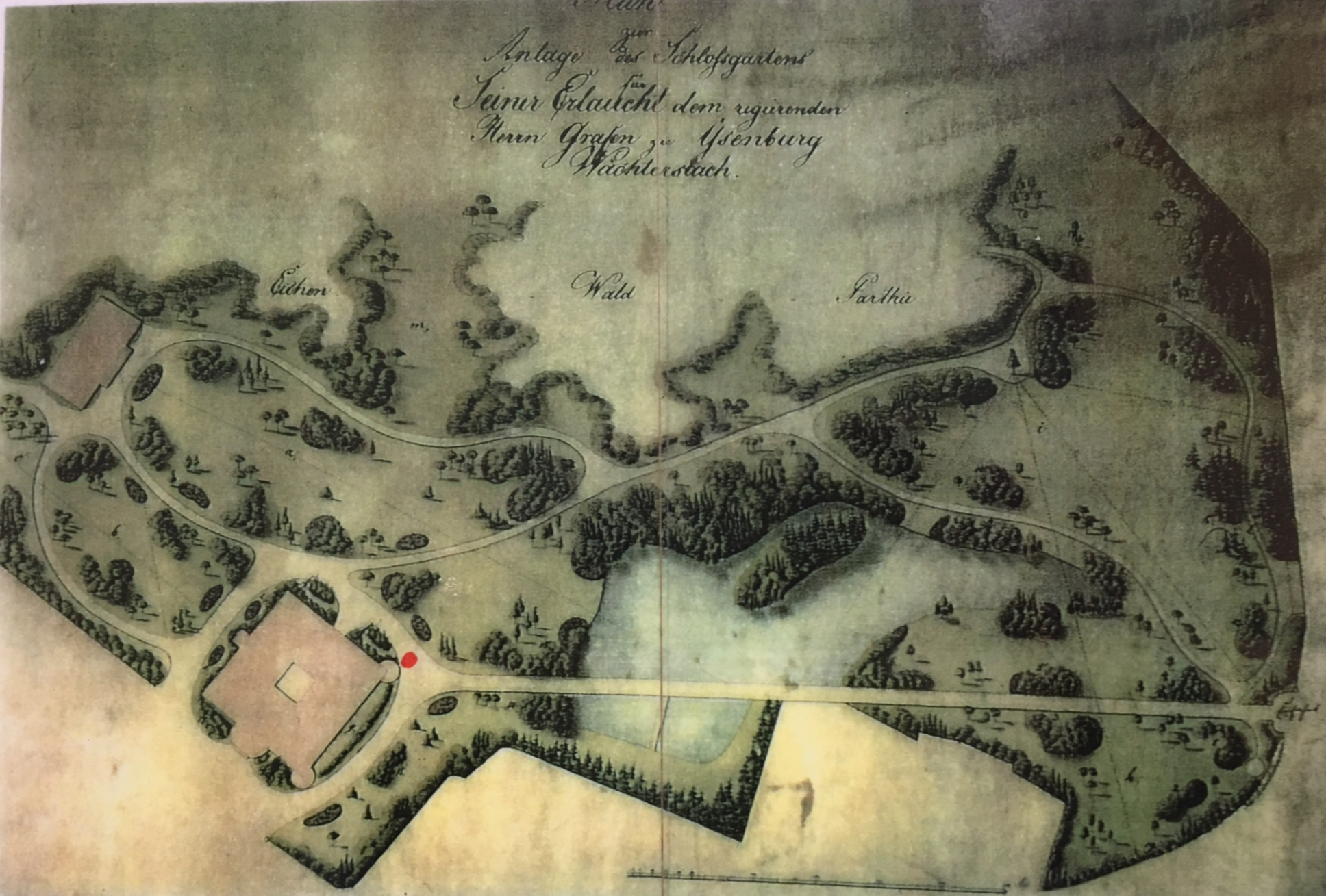 Gestaltungsplan für den Schlossgarten Wächtersbach